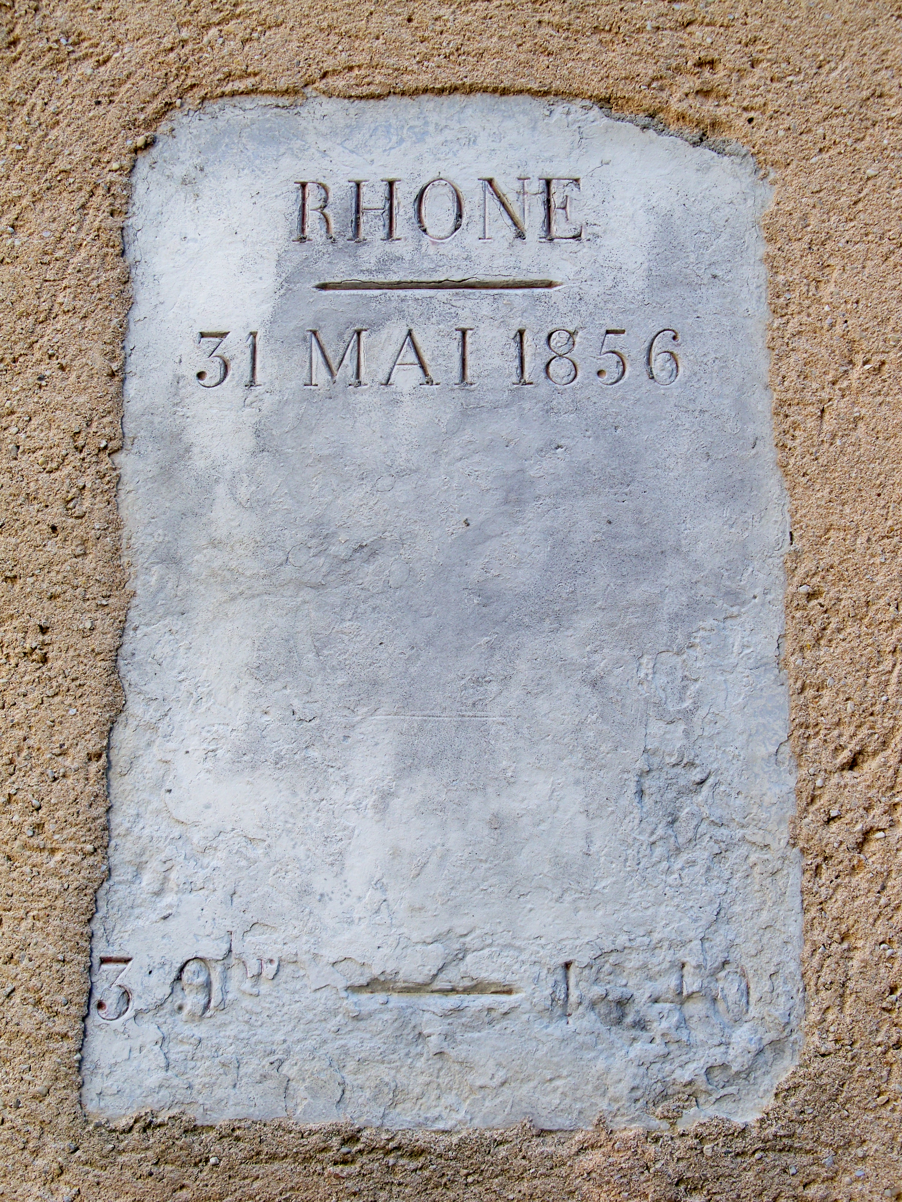 Plaque sur la mairie, notant les niveaux d'eau, lors des innondations du Rhône le 31 mai 1856 (environ 1,70 m de la chausée) et le 3 novembre 1840 (1,40 m de la chaussée).